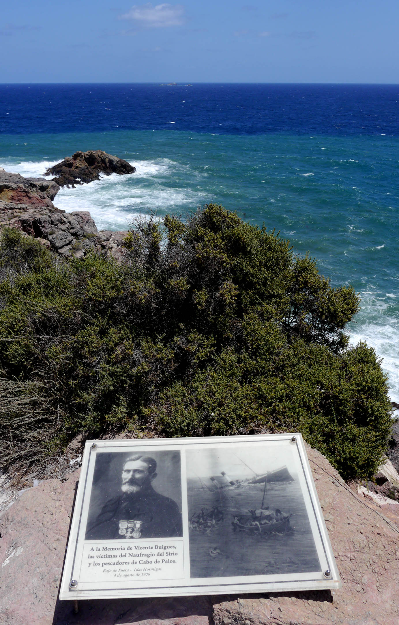 Placa conmemorativa del hundimiento del Sirio en el faro de Cabo de Palos.